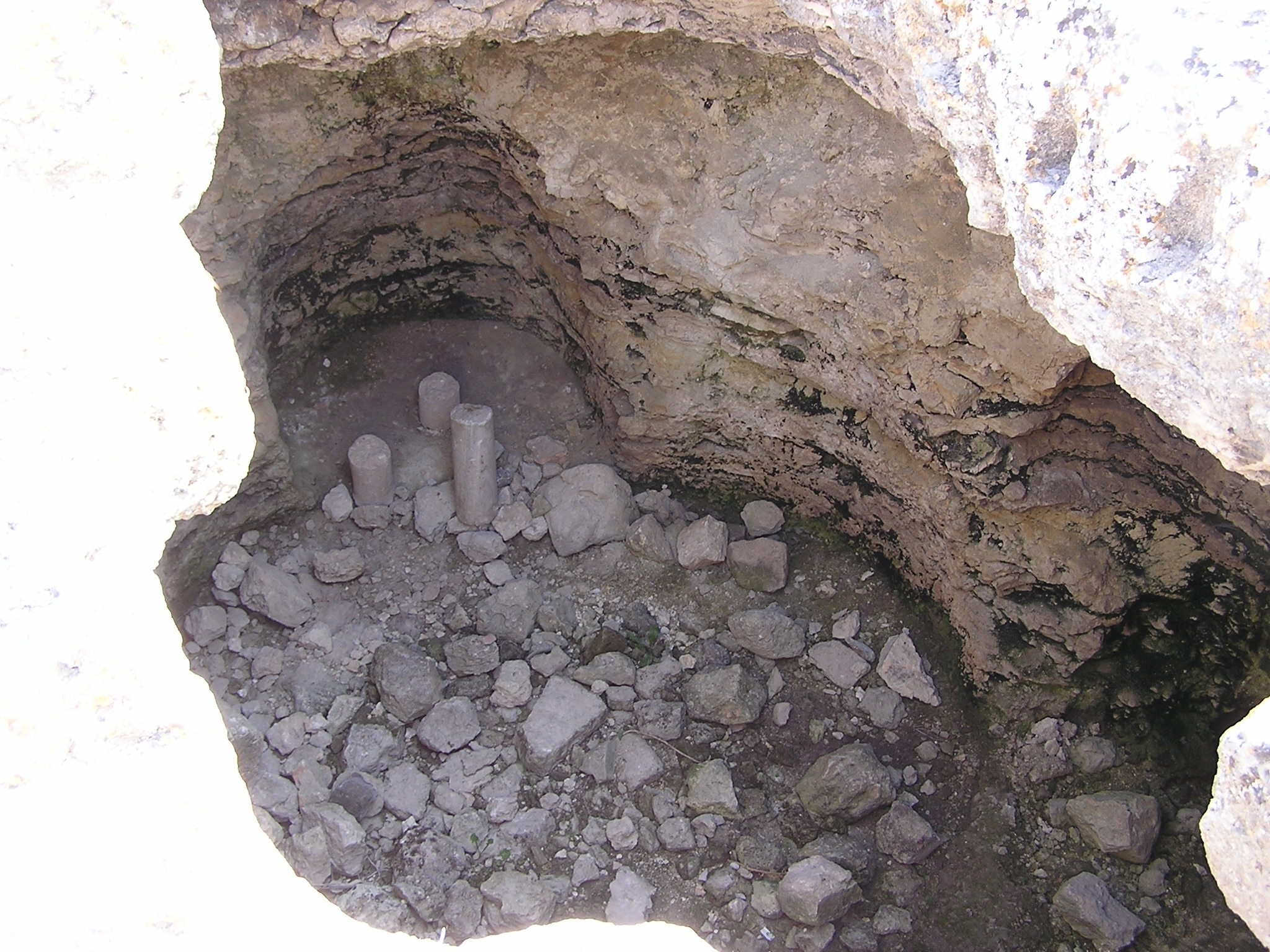 Херсонес. Капела-мартирий с подземным мавзолеем